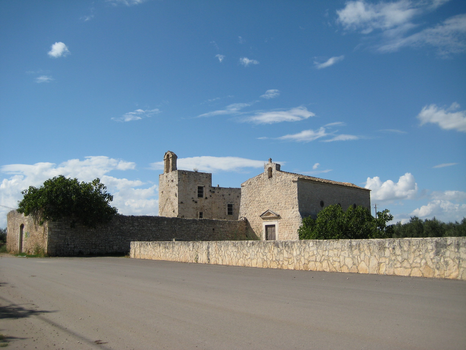 Bisceglie. Il casale di Zappino